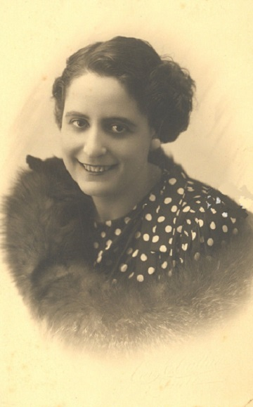 Sara Scuderi